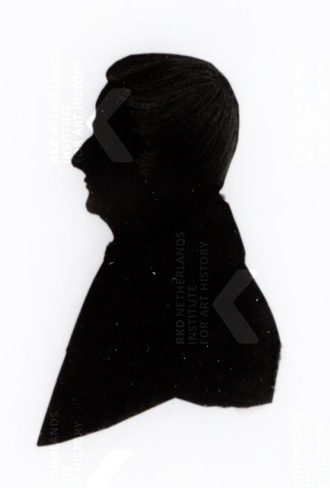 geknipt portret van Johan Henrik Beucker Andreae (1811-1865)